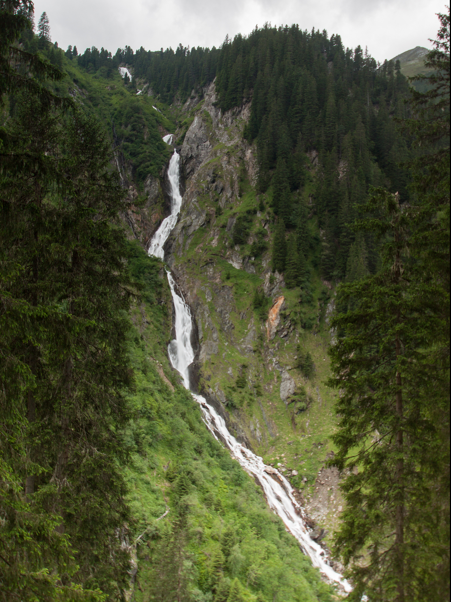 Seebachfall, ein 300 Meter hoher Schleierfall. This media shows the natural monument in Salzburg with the ID NDM00204.